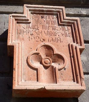 Ղազարոս Սարգսյան, «Հոկտեմբեր» կինոթատրոն